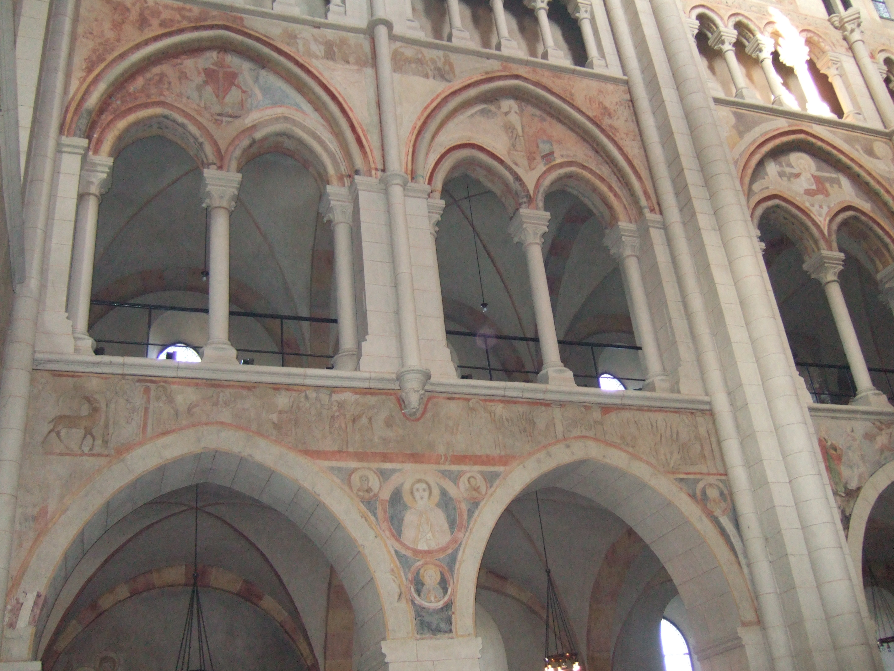 Dom in Limburg an der Lahn (Innenansicht Ostwand)